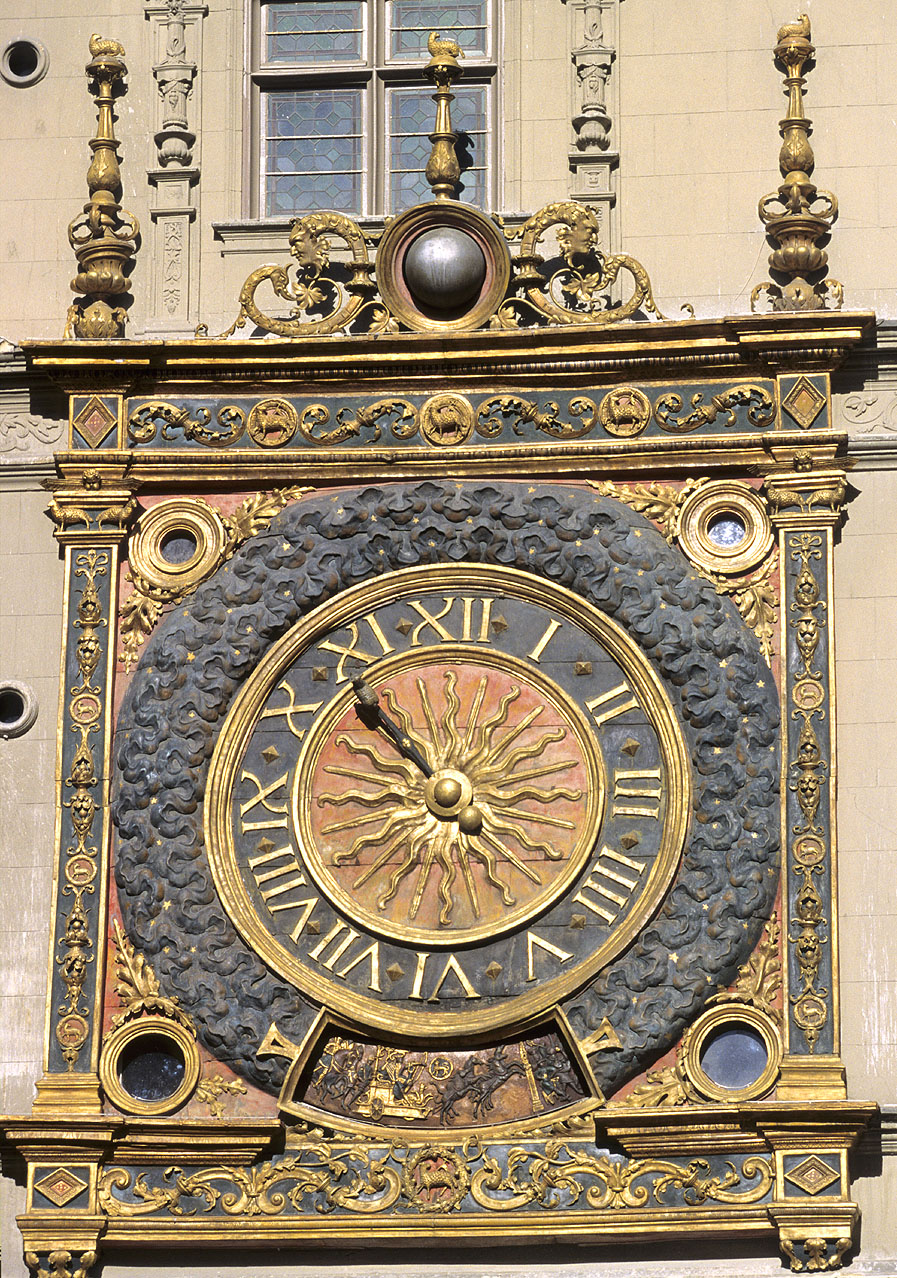 Gros-Horloge et fontaine (Classé) .